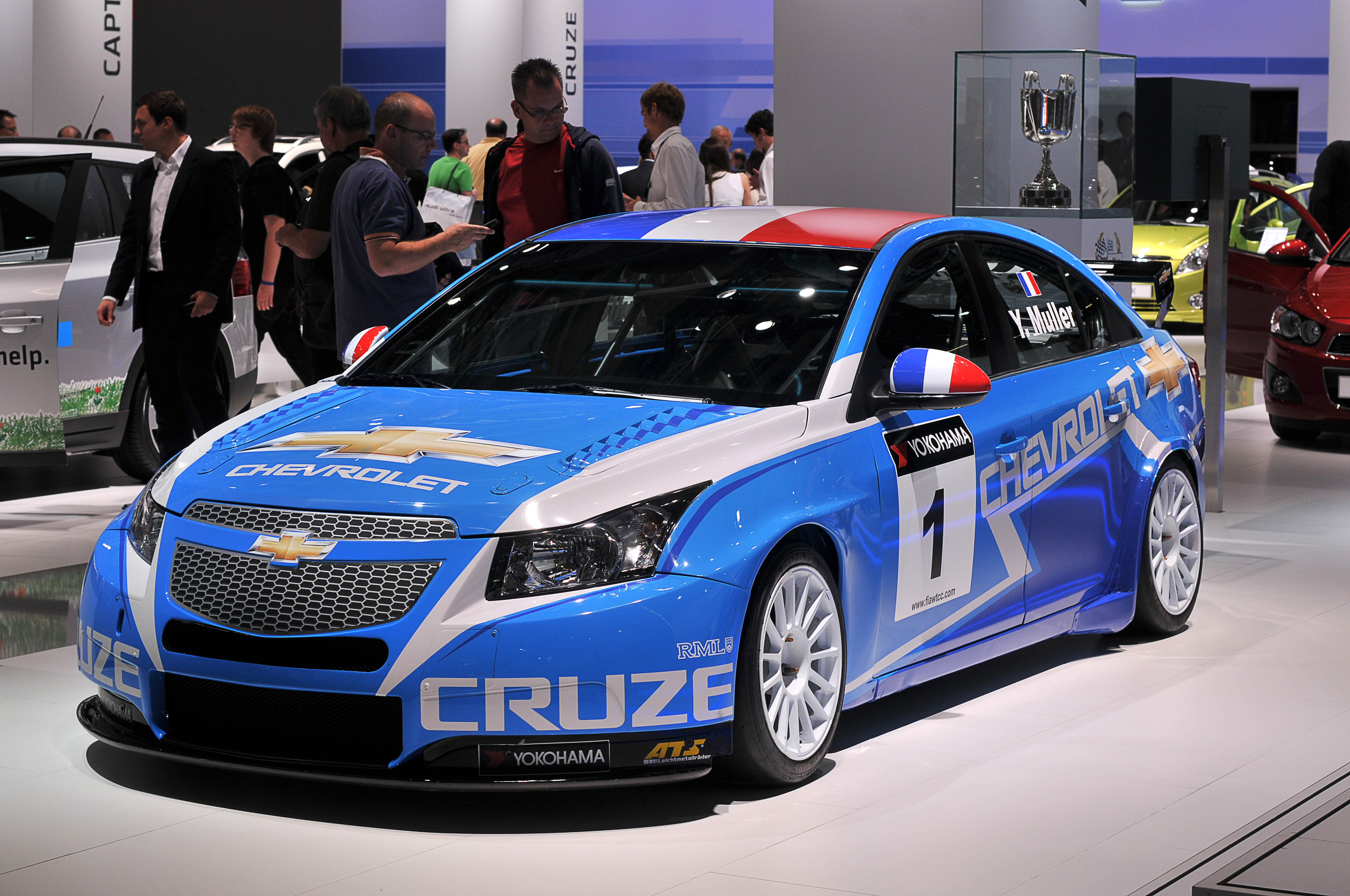 IAA 2011